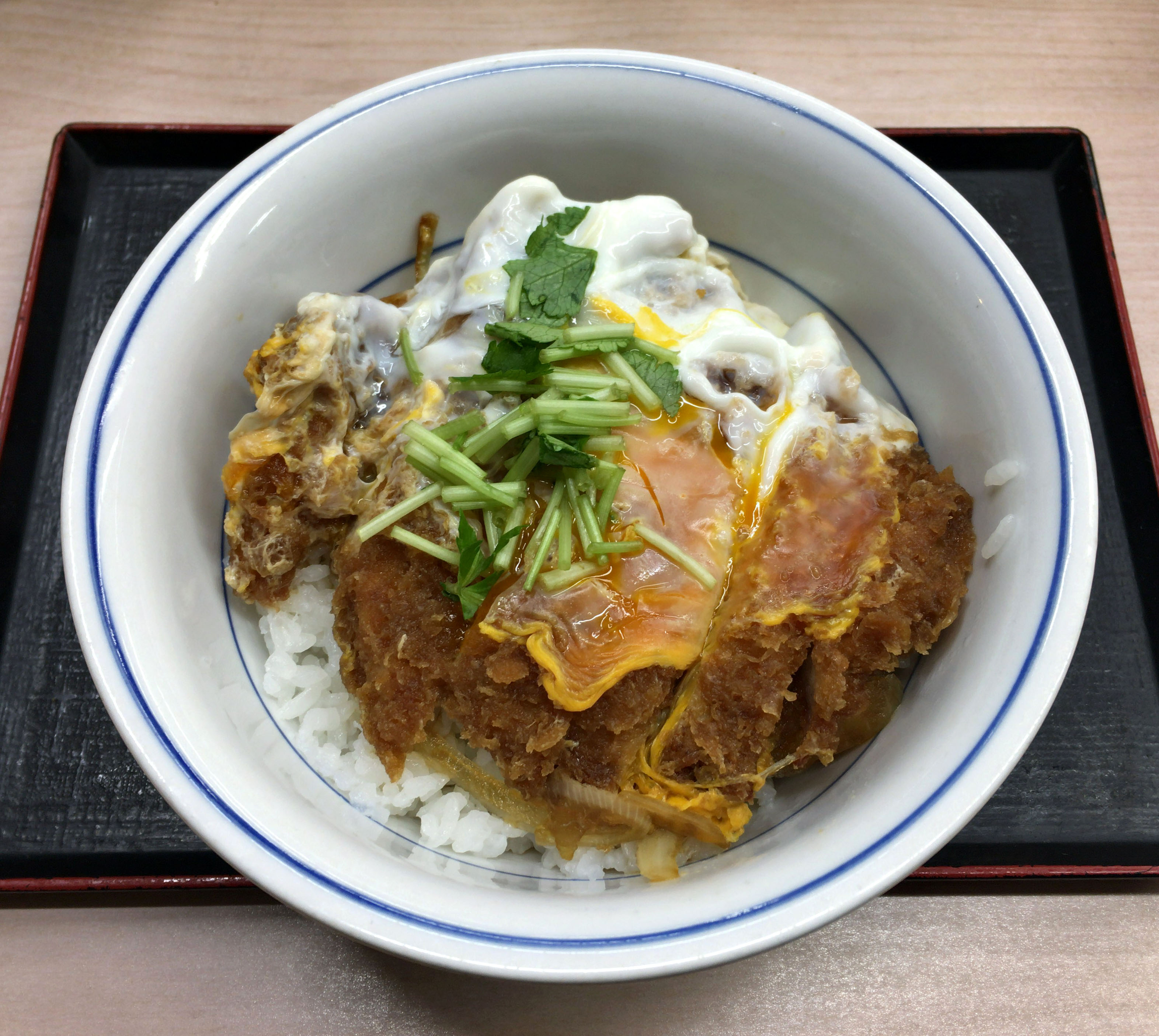 かつやのカツ丼（松竹梅のうちの梅、80gロース）